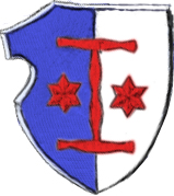 Schild der Berliner Patrizierfamilie Blankenfelde